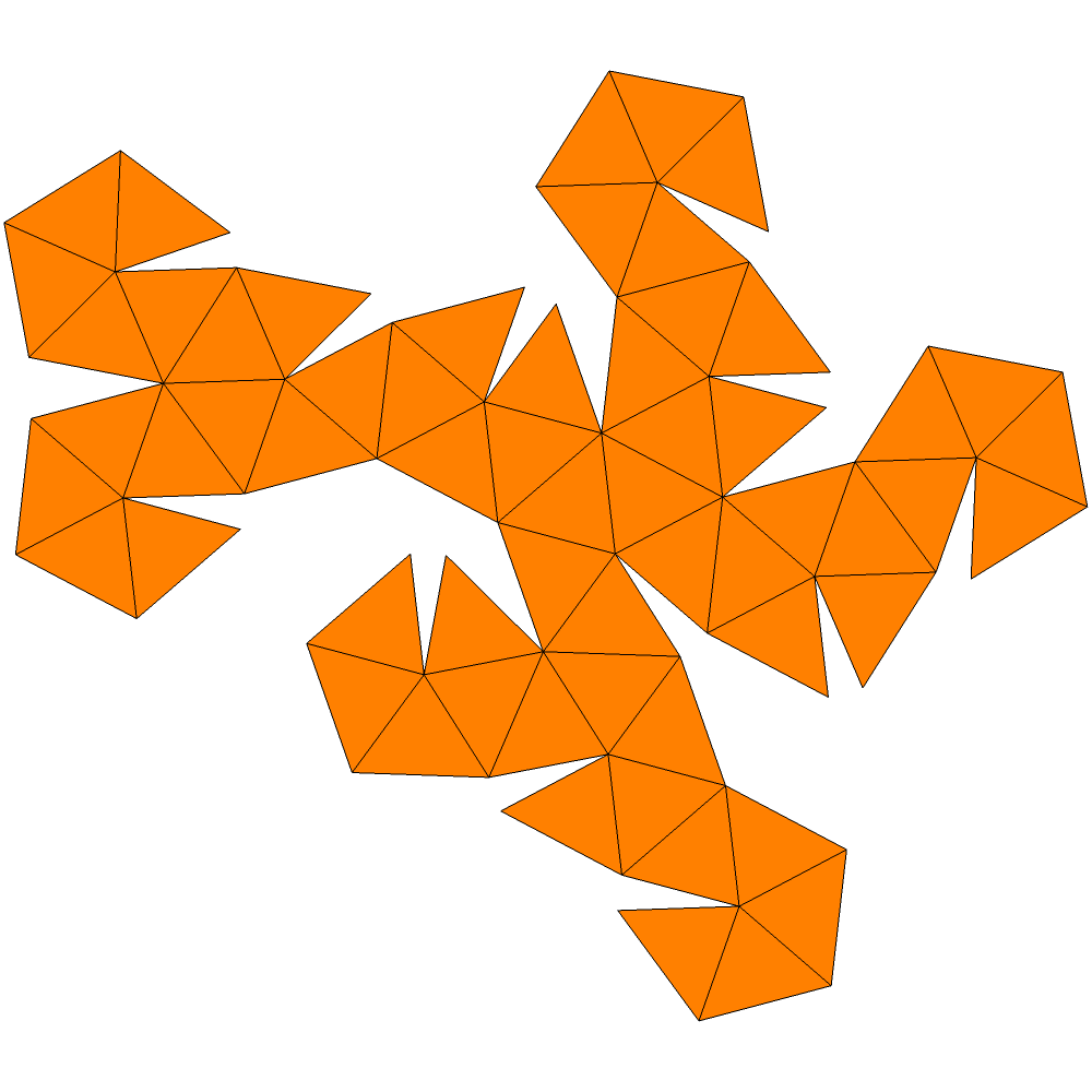 Pentakisdodecahedron net